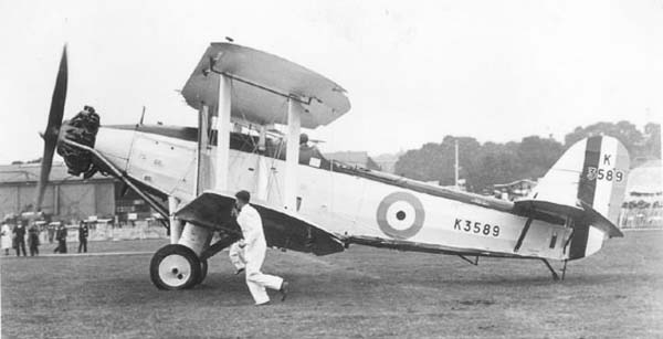 Ein britischer Blackburn Baffin Torpedobomber